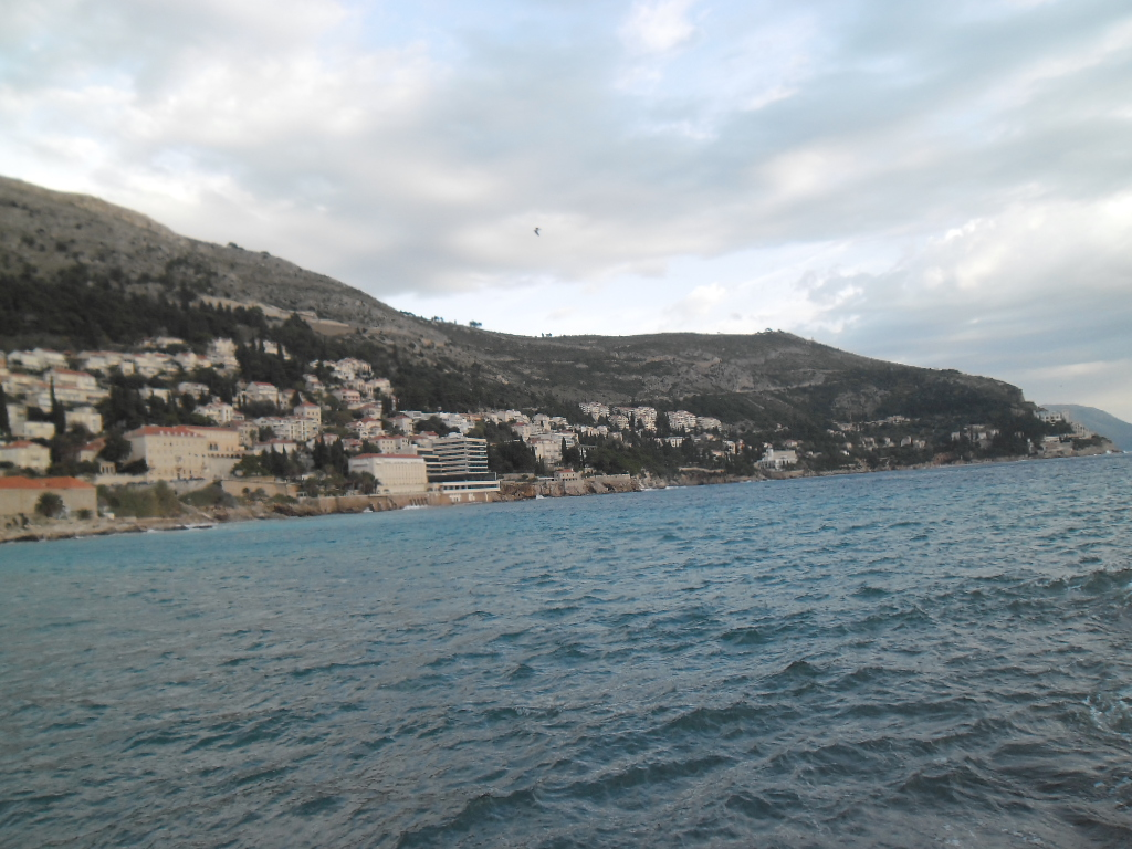 Ploče-Iza Grada